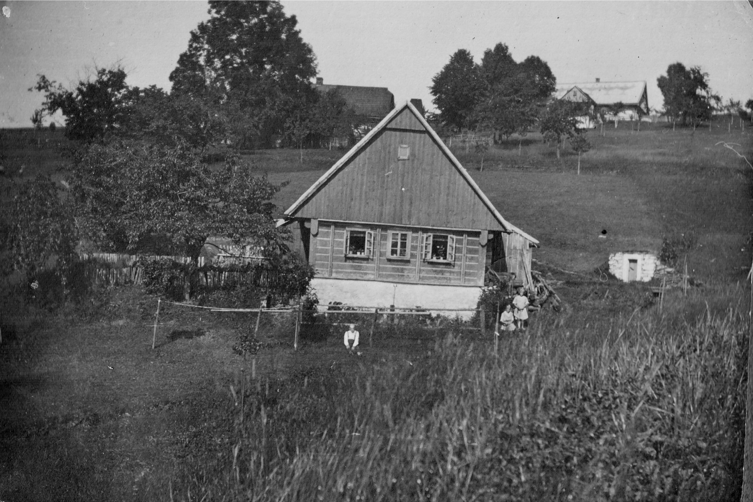 Historický snímek Rychtrovy boudy v původní podobě před přestavbami. Pořízeno Zdeňkem Zuskou starším okolo roku 1895